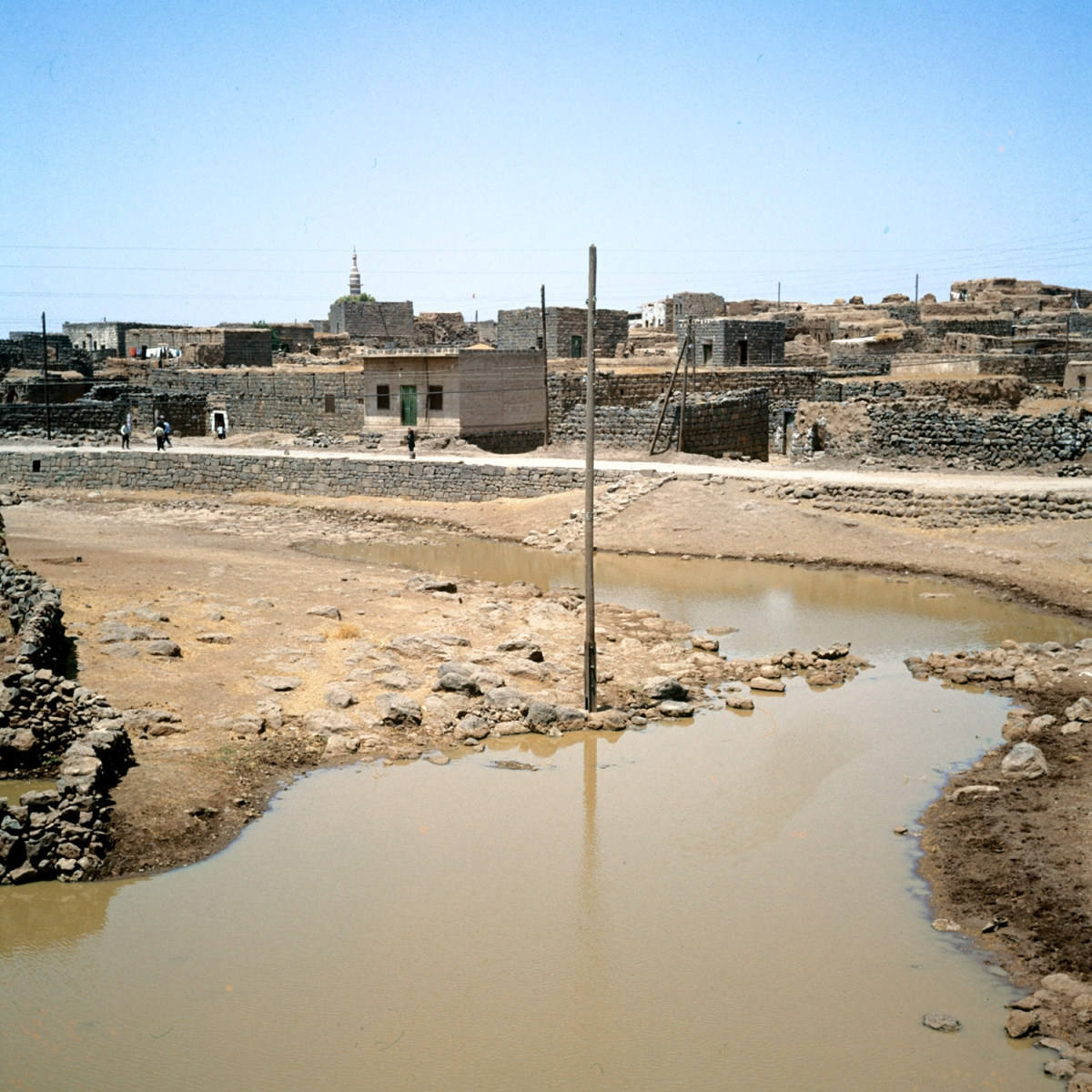 Gezicht op een dorp ten noorden van Dar'a.